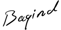 Logo společnosti Bagind s.r.o., která se zaměřuje na výrobu a prodej kožených doplňků, batohů, kabelek a cestovních tašek.